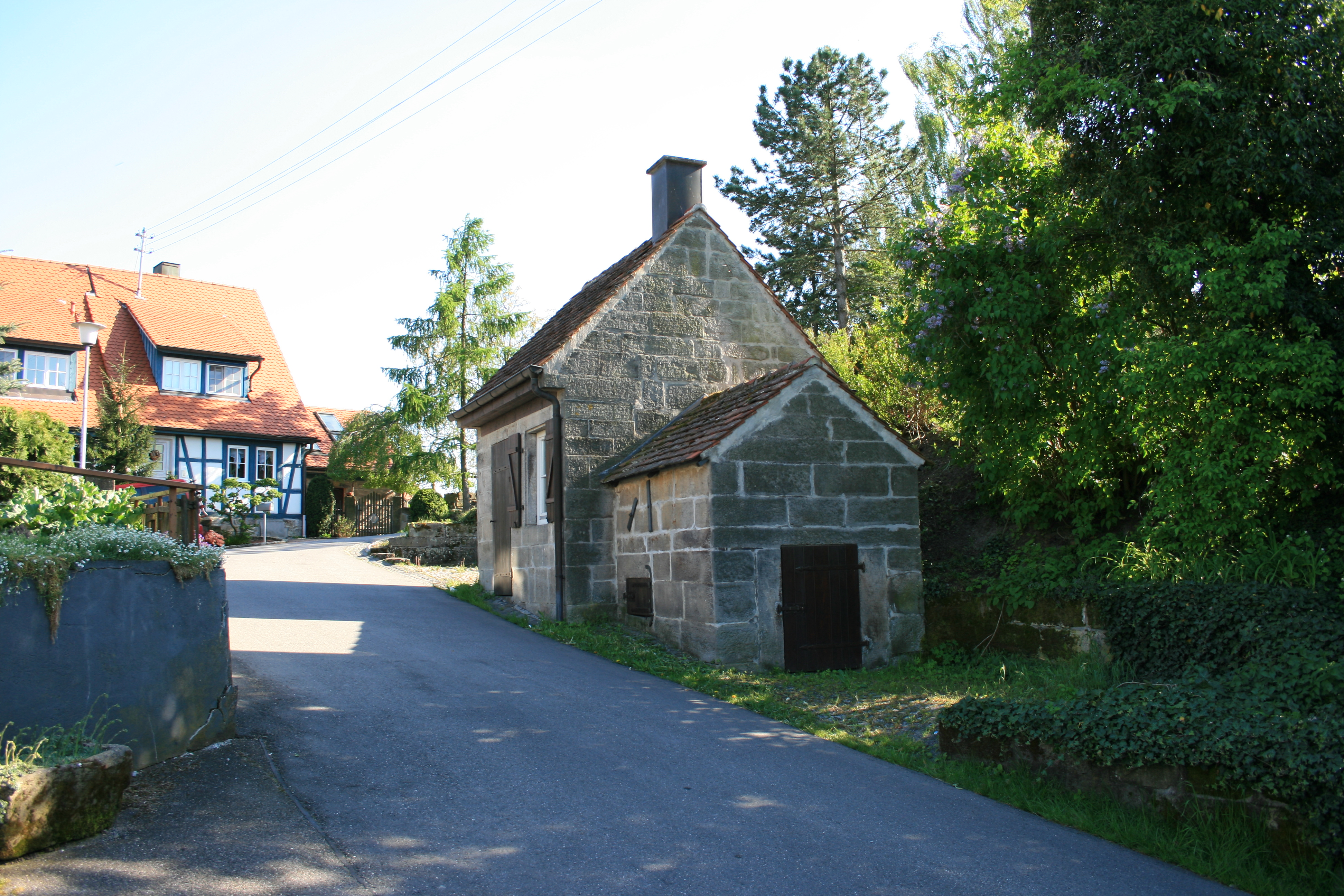 Das Backhaus in Pfedelbach-Gleichen mit angebautem Schweinestall